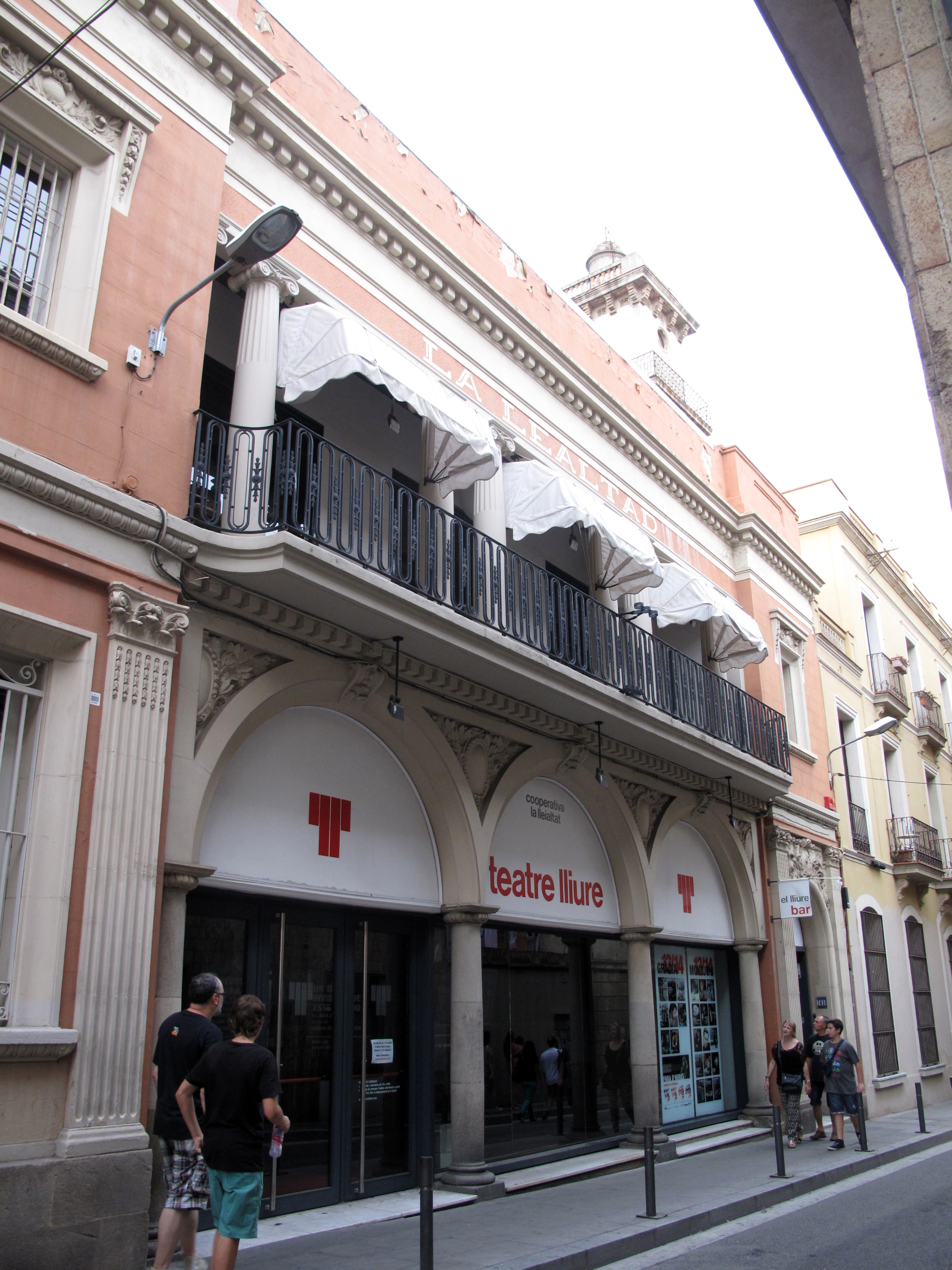 Cooperativa Lleialtat (Barcelona)